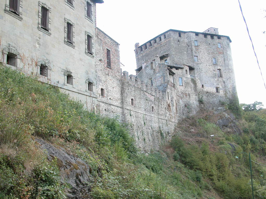 Foto mia personale, castello di Rocca d'Olgisio, 2007